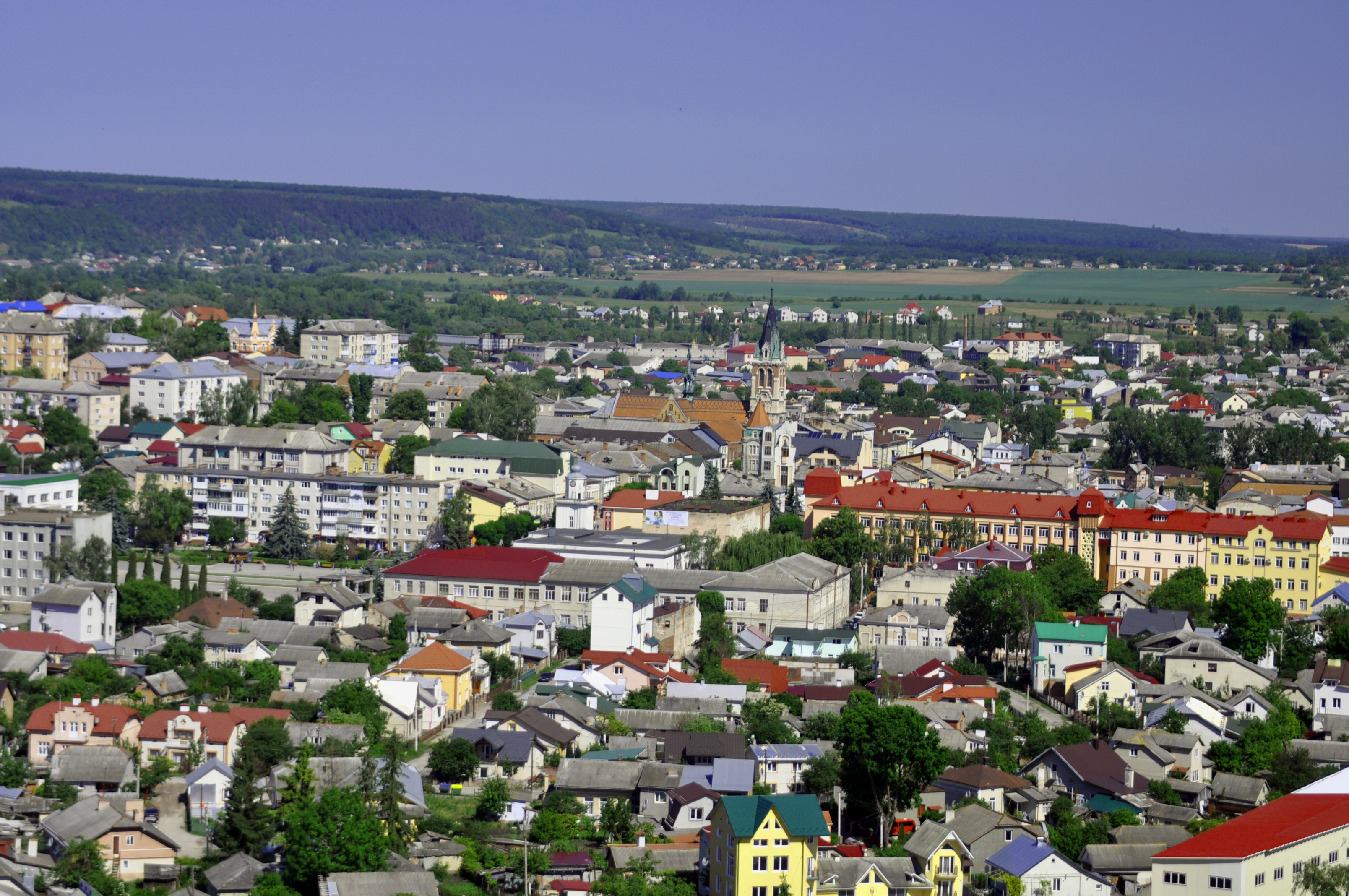 Чортків